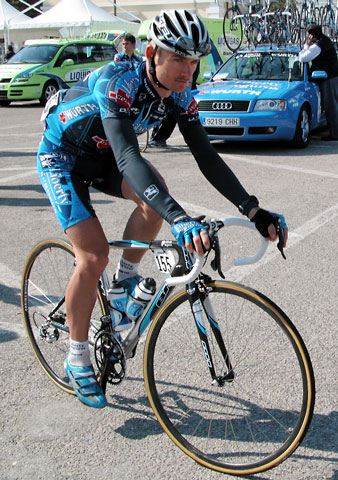 Jan Hruška.